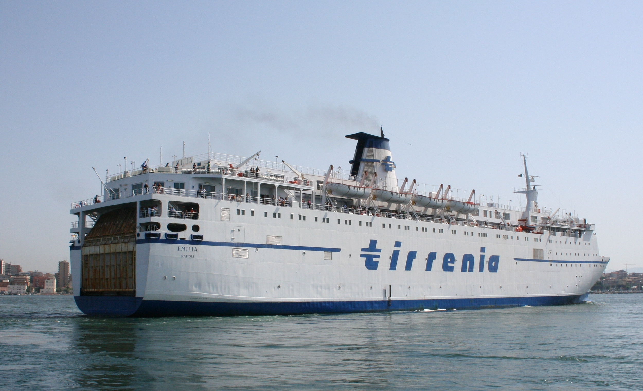 Nave Emilia nei pressi del Porto di Cagliari - Luglio 2005. Armatore Tirrenia di Navigazione - Napoli.